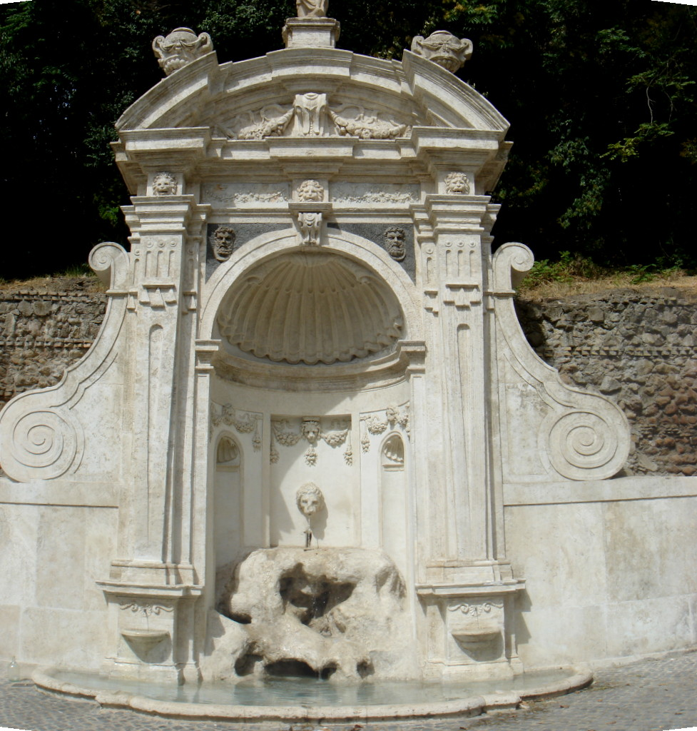 Roma, Trastevere: Fontana del Prigione a via Goffredo Mameli (di fronte a Luciano Manara) (già a Villa Peretti)